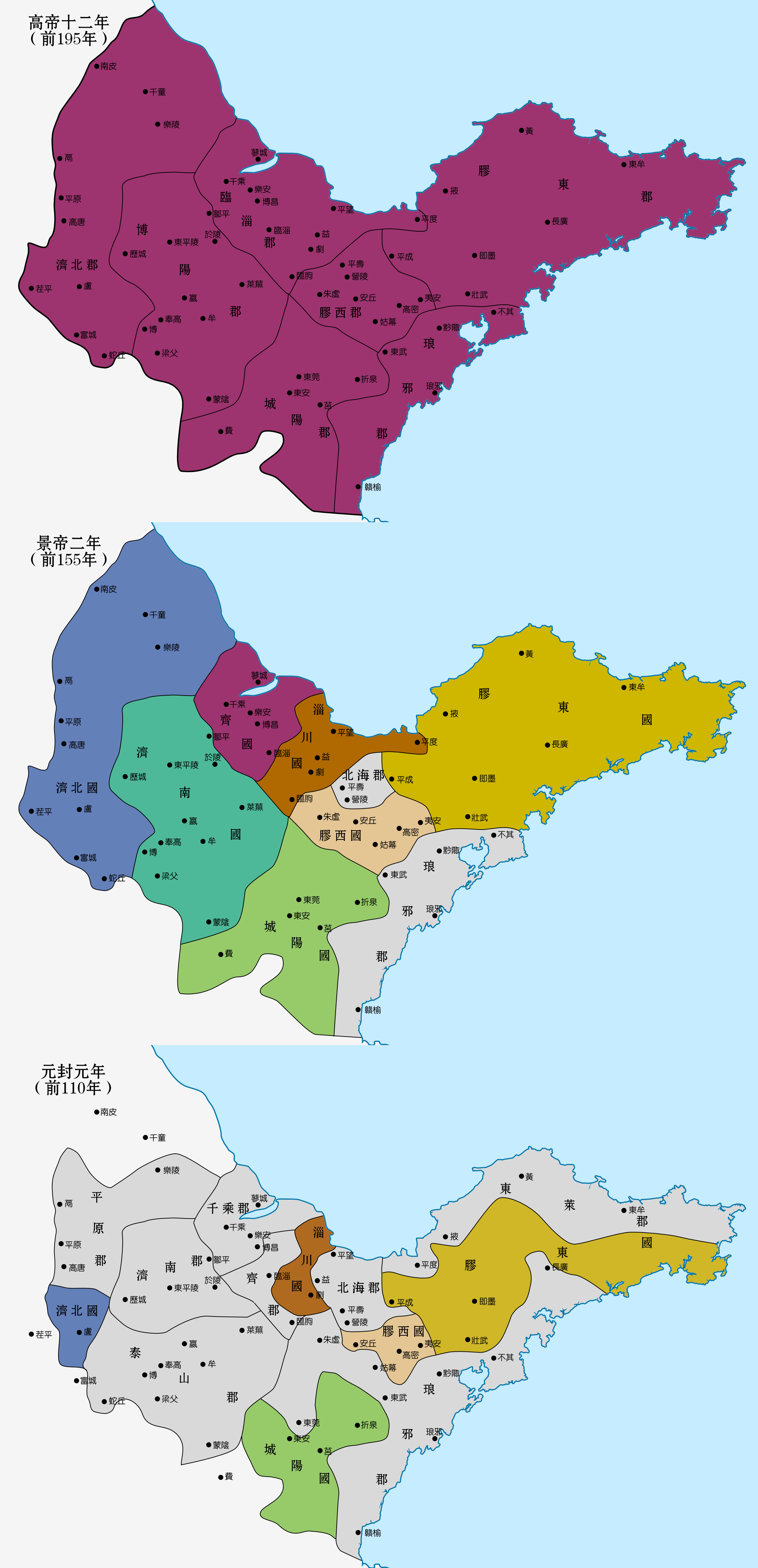 中文（中国大陆）: 上图：高帝十二年，齐悼惠王七年齐国疆域。中图：景帝二年，七齐及北海、琅邪二郡。下图：元封元年齐地郡国。 图中地名、边界参考谭其骧《中国历史地图集》、周振鹤《西汉政区地理》。